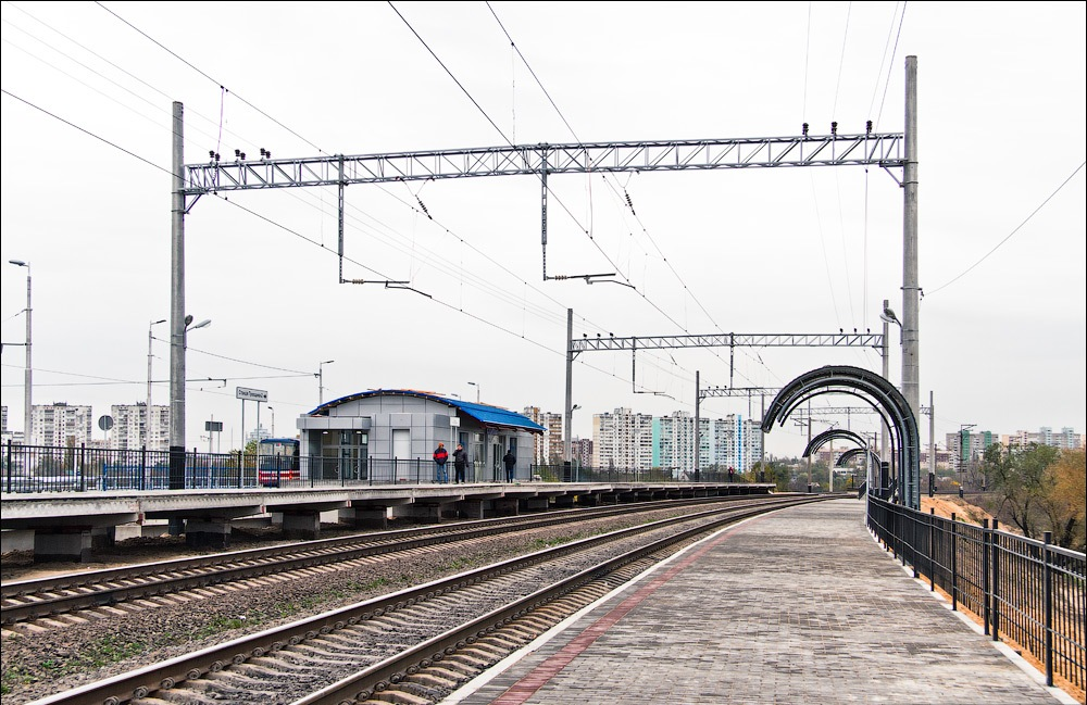 Станція Київської міської електрички Троєщина II